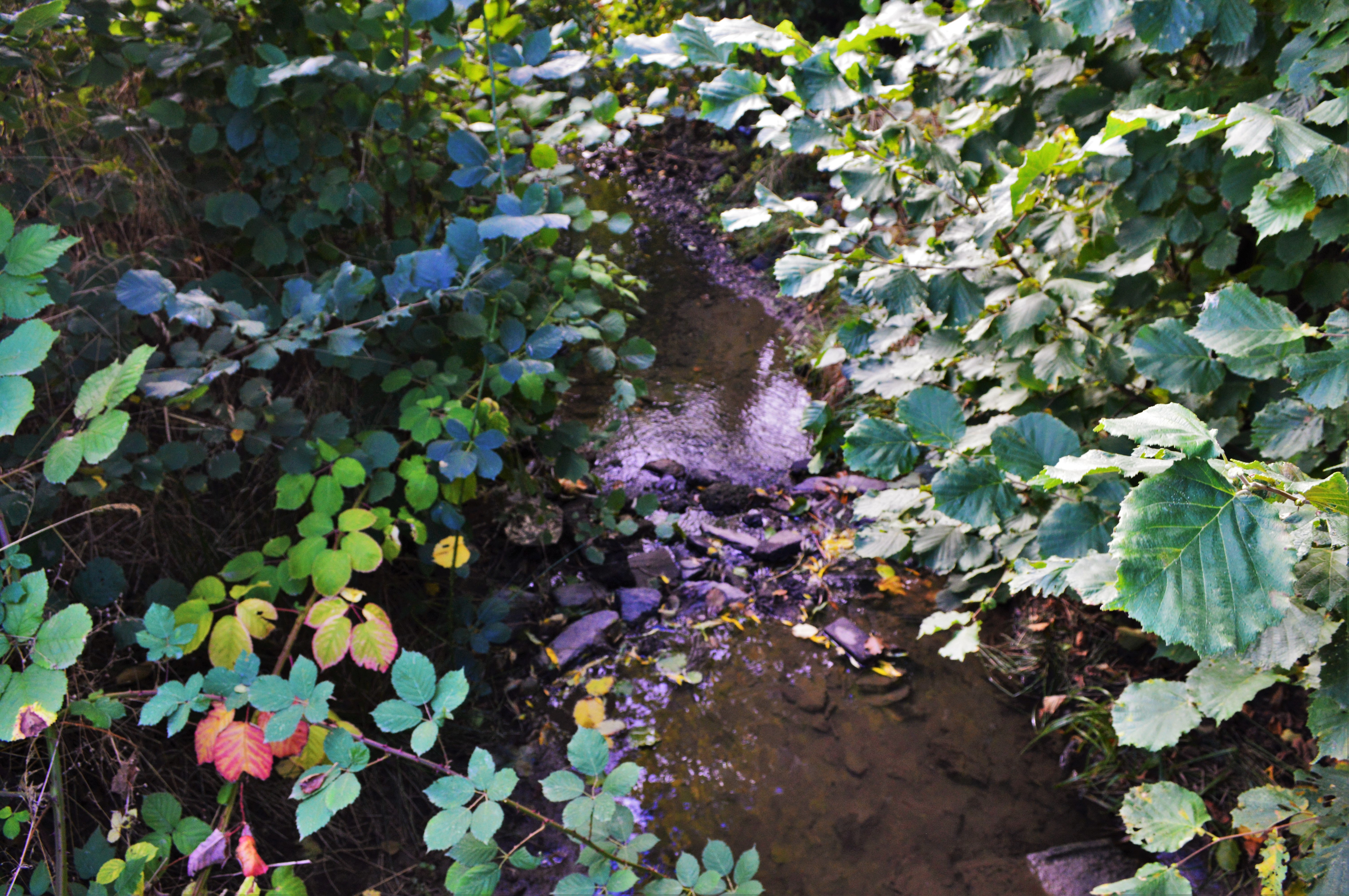 Eschbach - von Brücke am südlichen Ortsrand